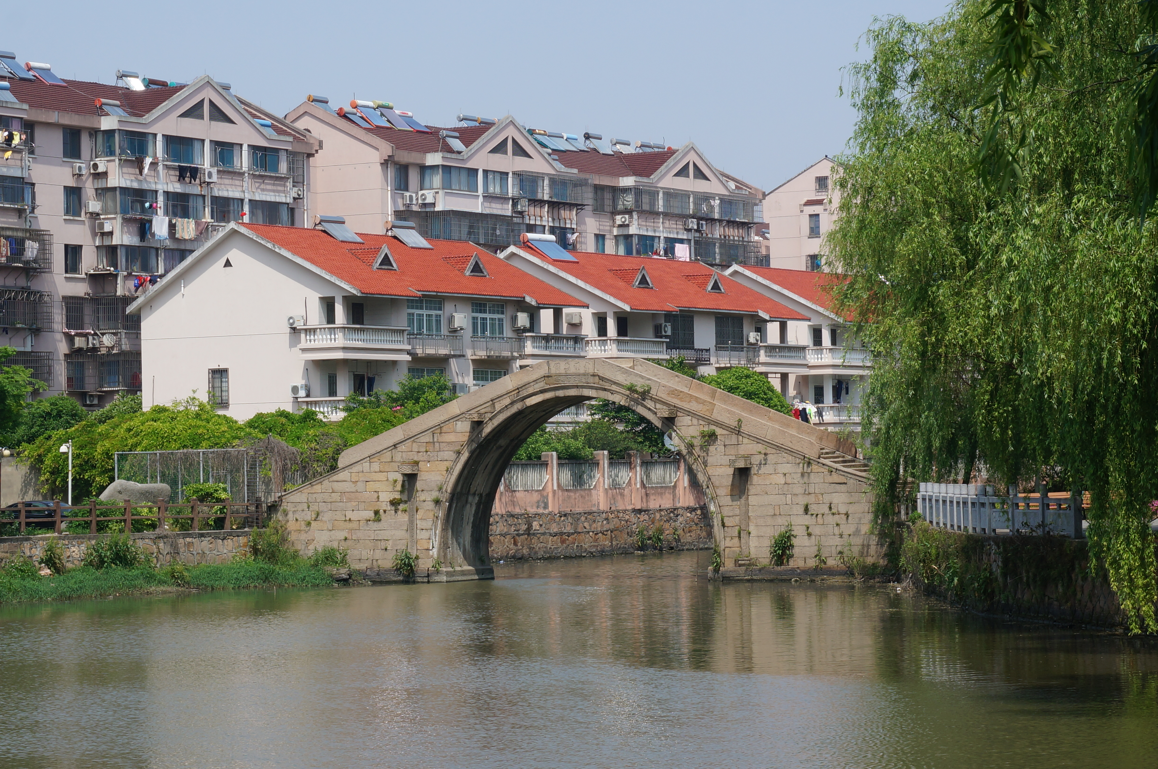 三官塘桥，西面。